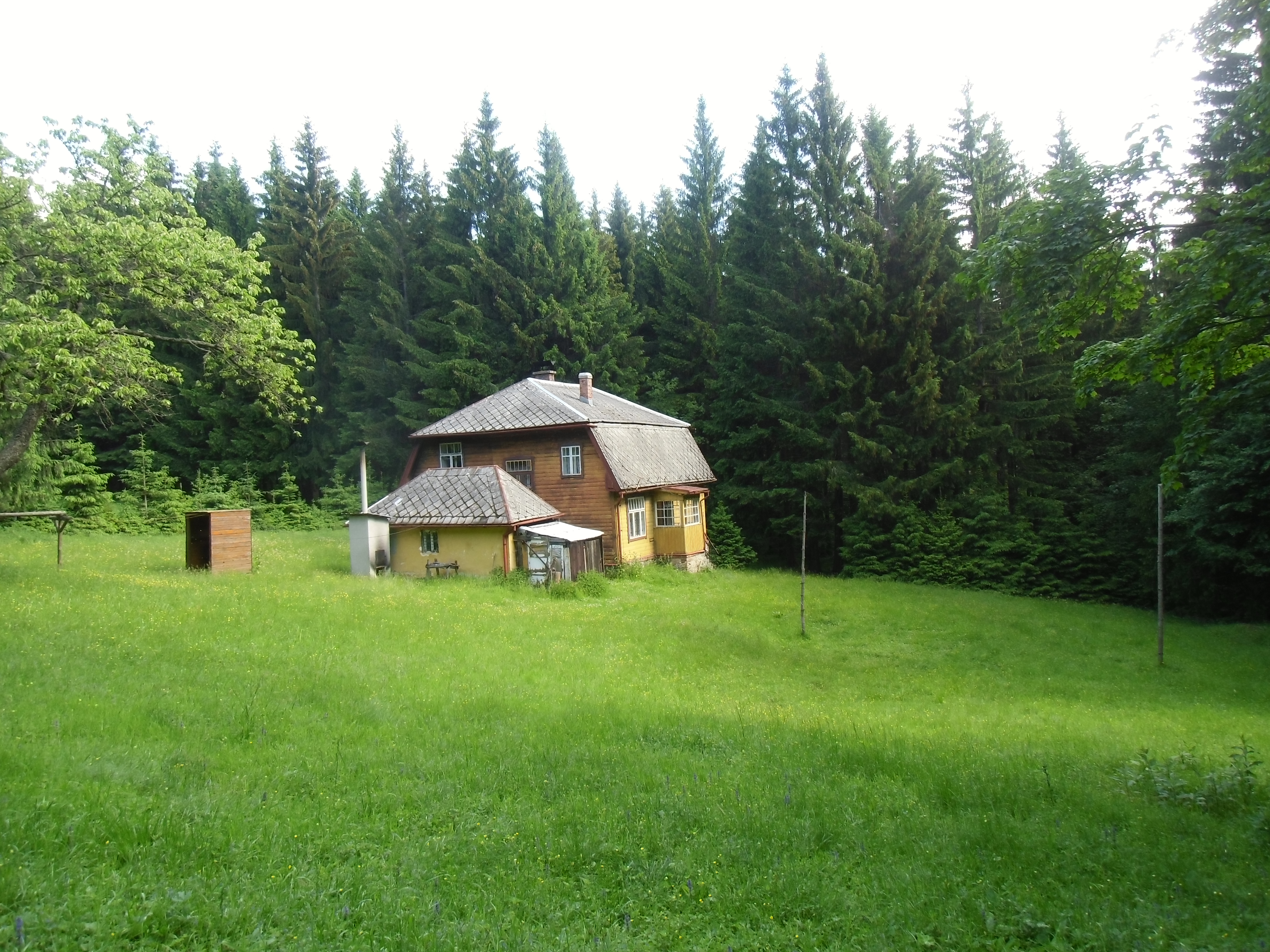 bývalá celnice Černý Kout